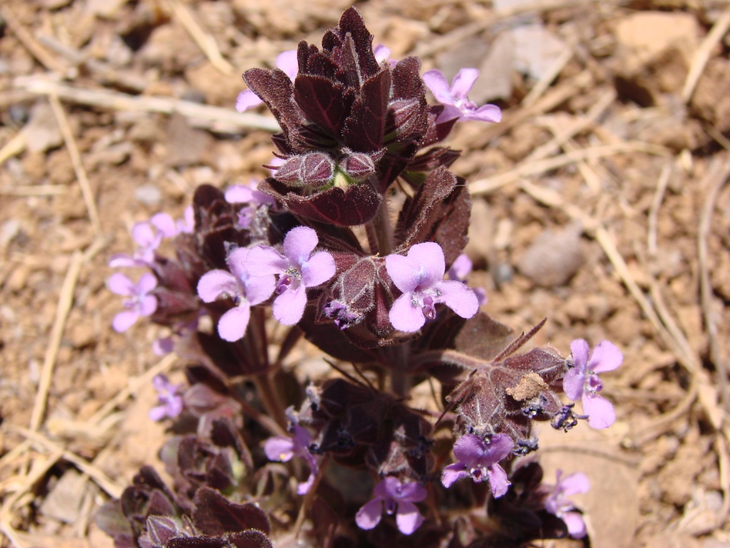 Marsypianthes montana Benth. - LAMIACEAE - APA da Bacia do Rio São Bartolomeu - Brasília - Distrito Federal - Brasil.